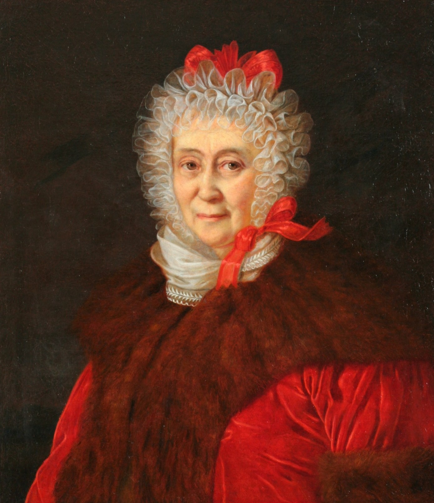 Прасковья Юрьевна Кологривова (1766—1846)